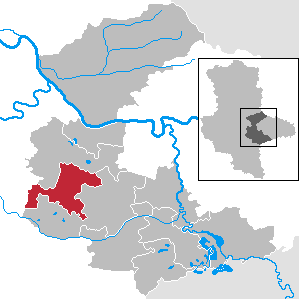 Köthen (Anhalt) in Sachsen-Anhalt - Landkreis Anhalt-Bitterfeld